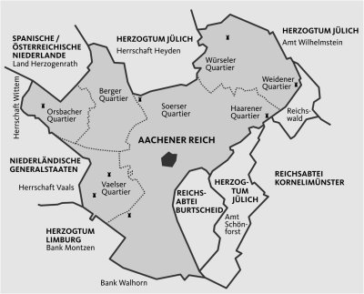 Zeichnung nach einem Kartenausschnitt